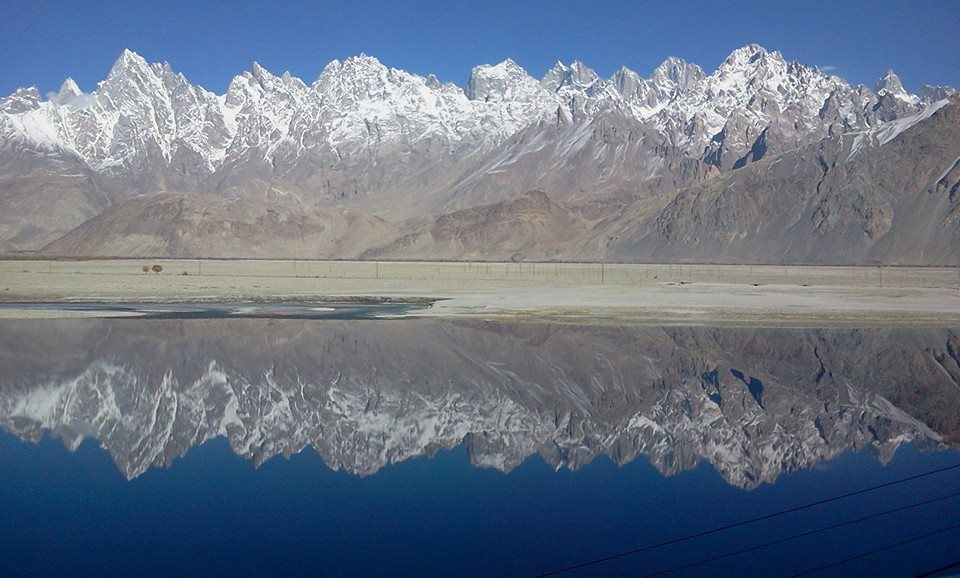 سلینگ پل سے لی گئی وادی غورسے کے برفیلے پہاڑوں کا دلفریب منظر